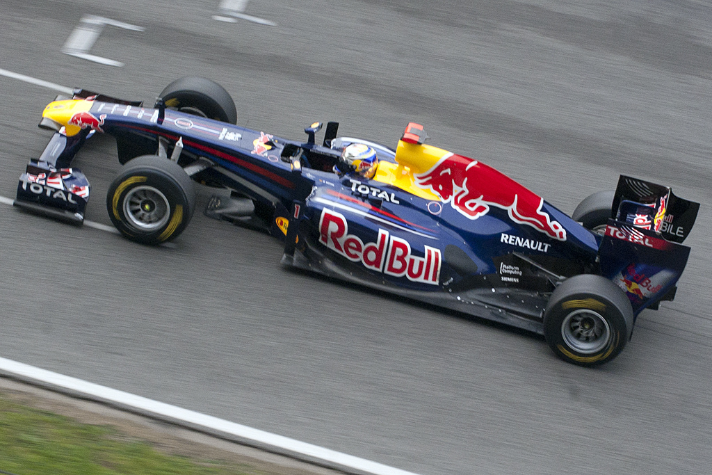 Vettel